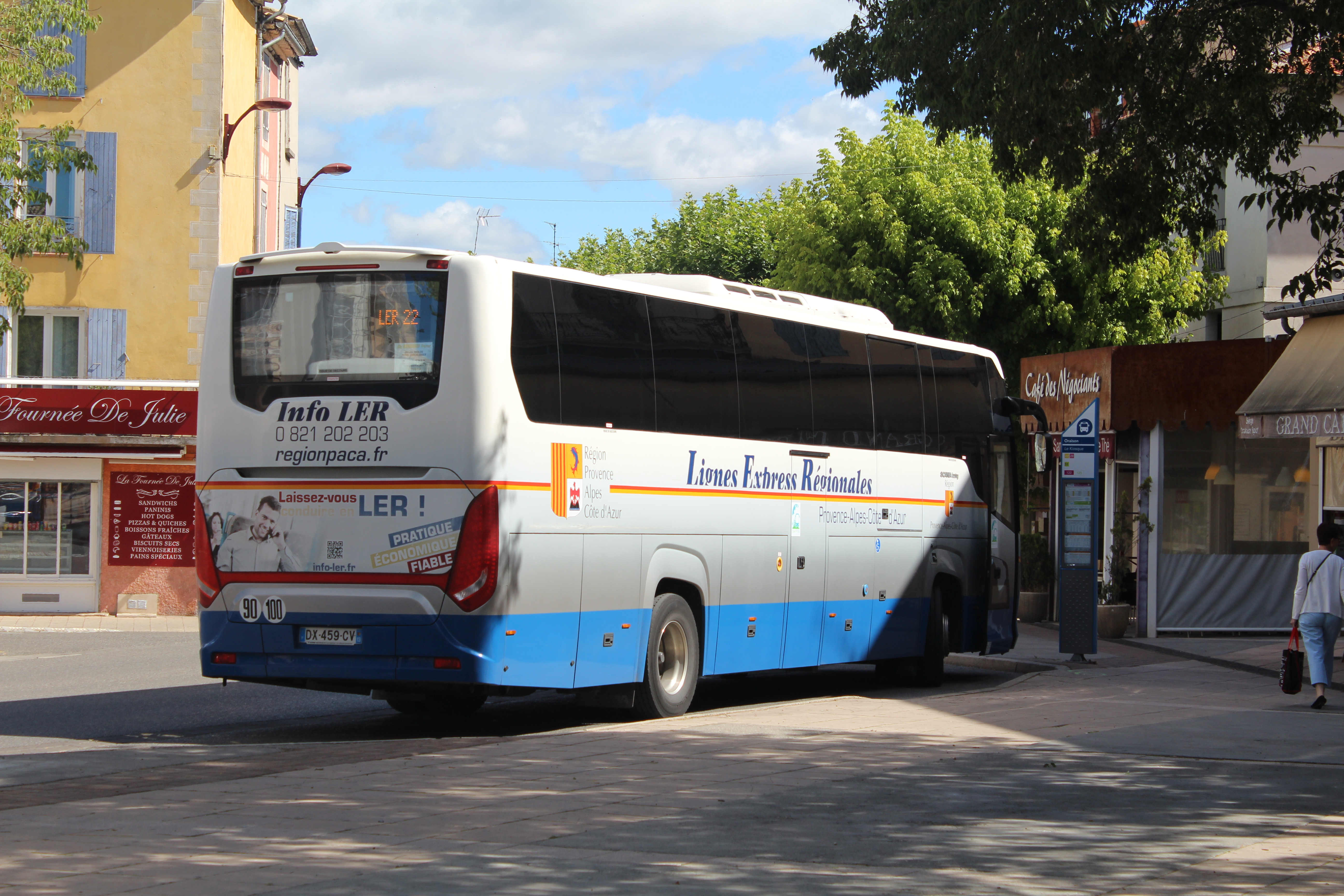 Bus du réseau LER Provence-Alpes-Côte d'Azur à Oraison.